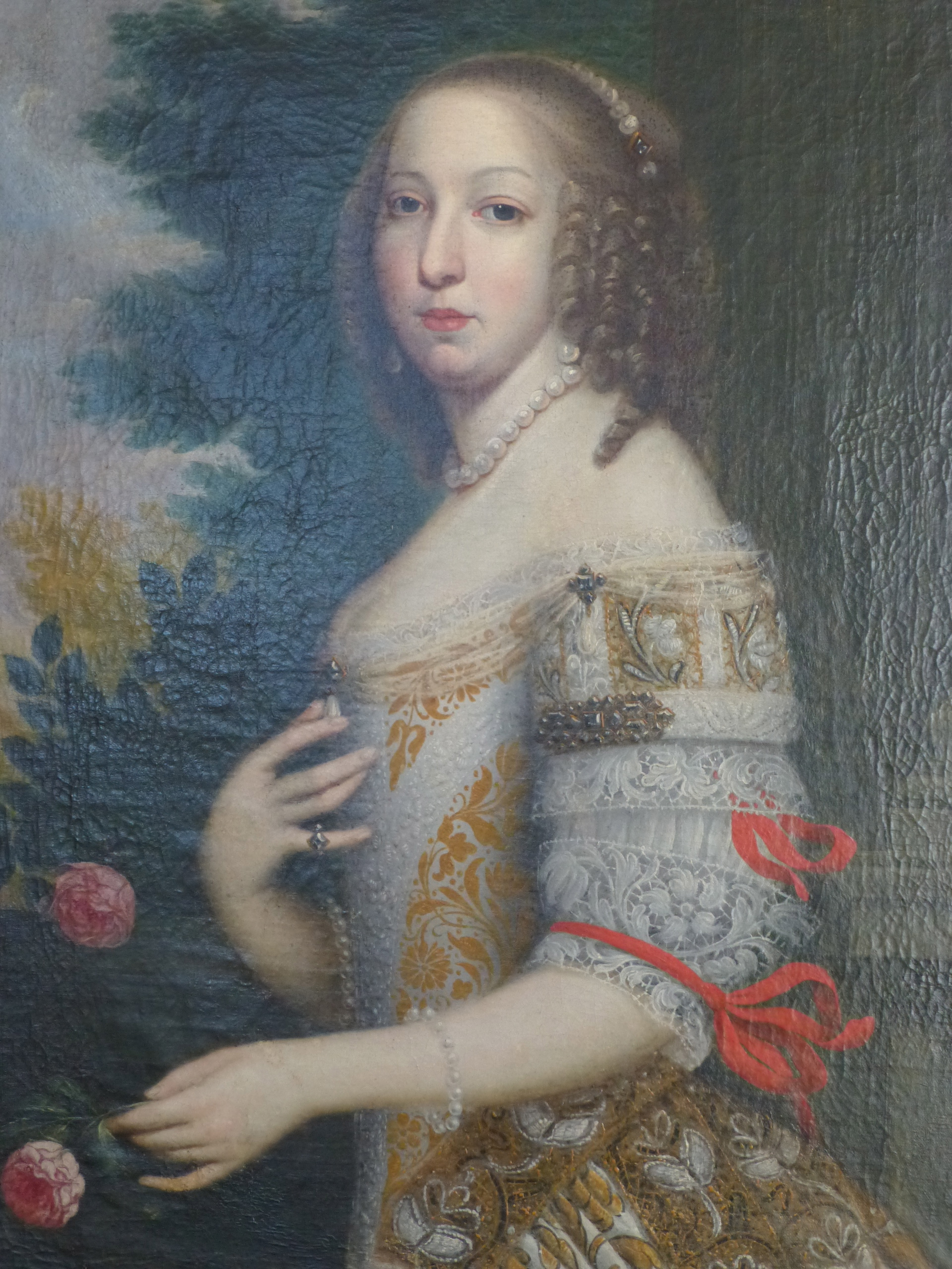 Clara Isabella von Arenberg (zweite Frau von Maximilian Willibald von Waldburg-Wolfegg); Potraitgemälde auf Burg Waldburg